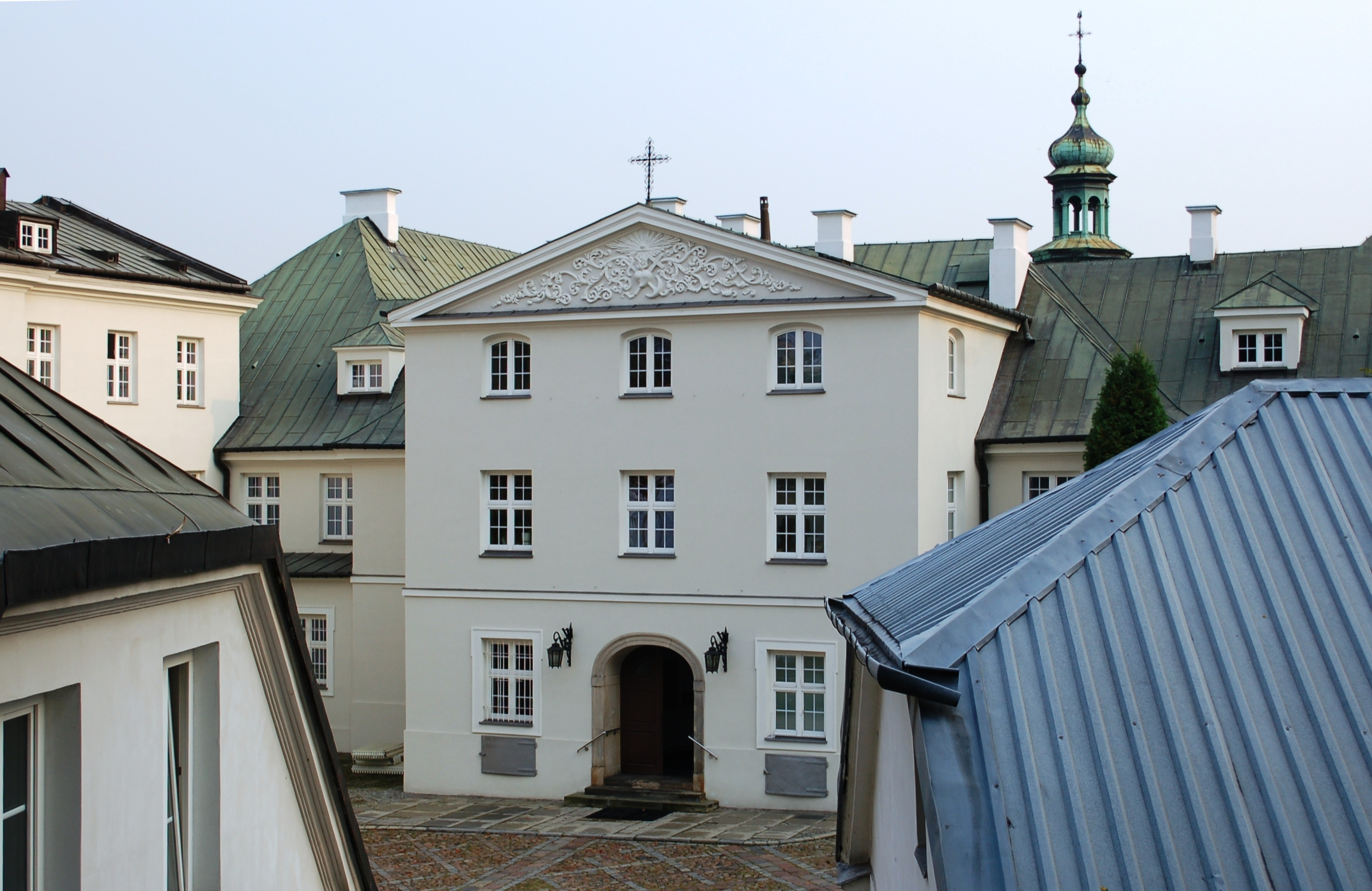 Kloster Warschau